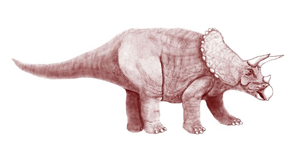 illustration d'un tricératops